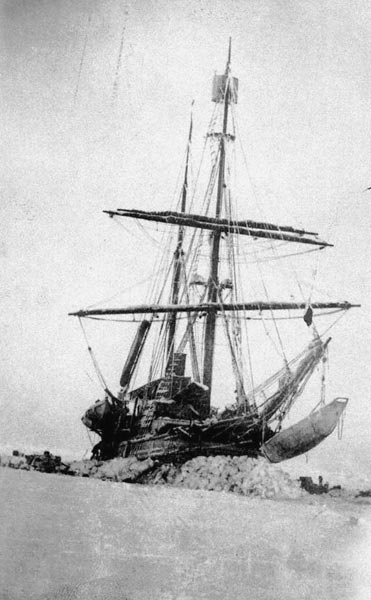 Fotografía del Karluk atrapado en los hielos del Mar de Chutki antes de hundirse el 11 de enero de 1914. Foto publicado en todos los diarios de la época en ocasión del rescate de los supervivientes.